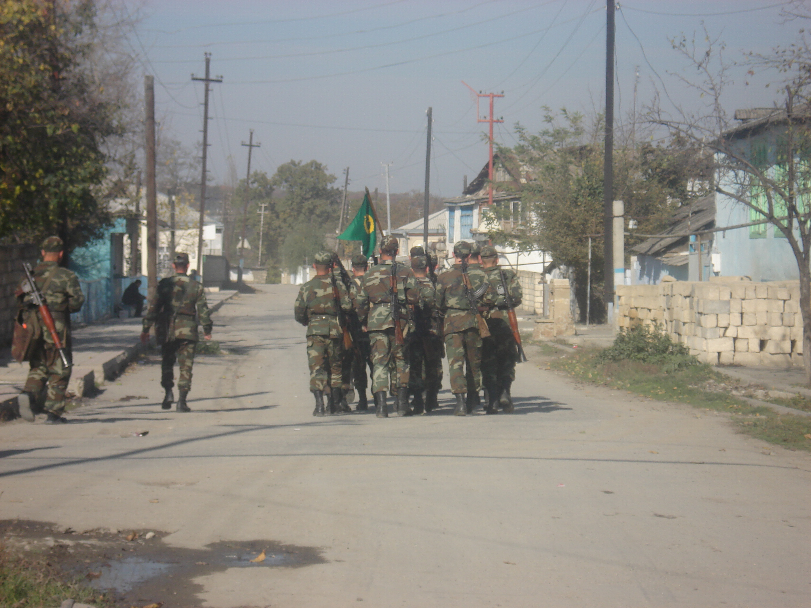 Солдаты в Кусарах